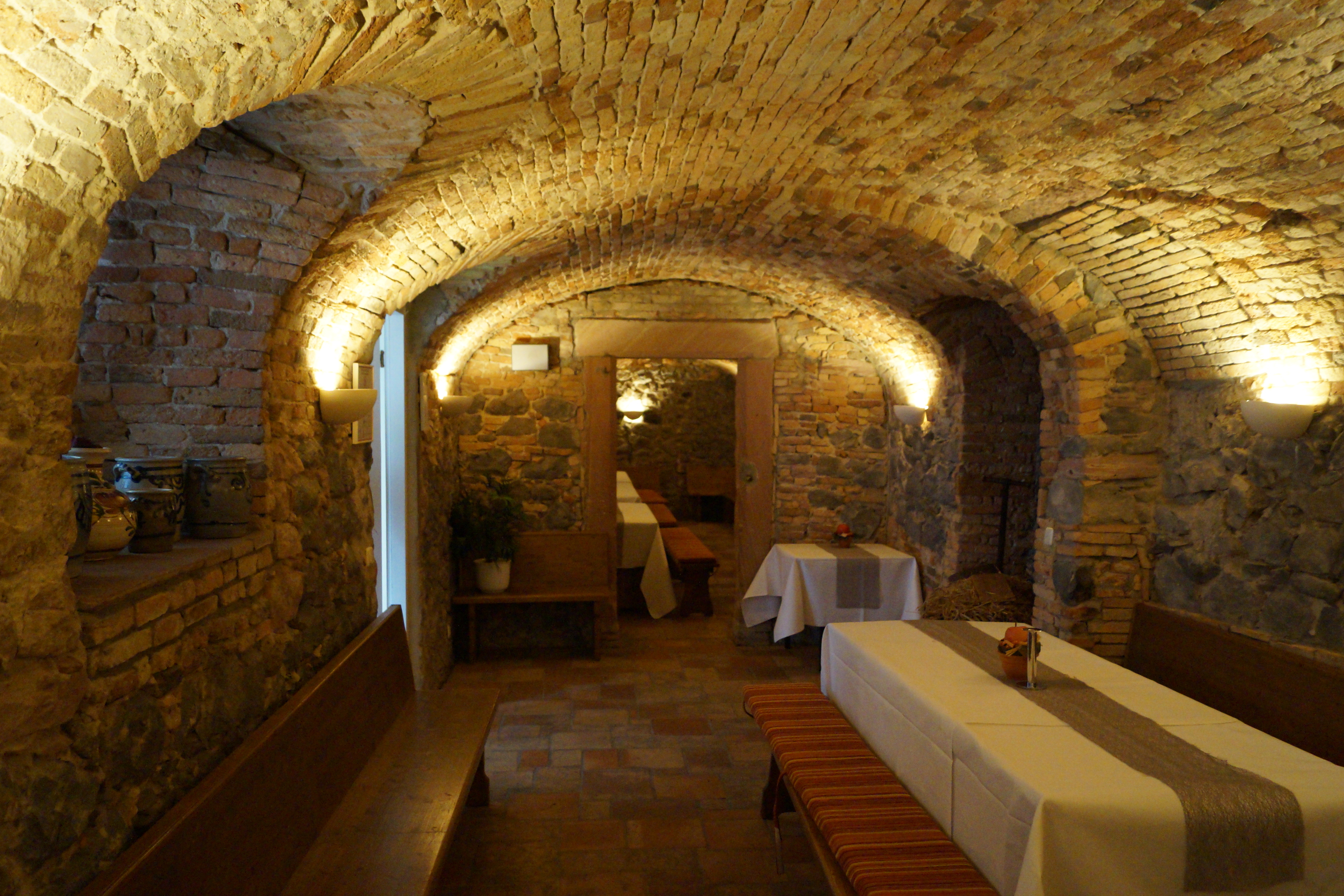 Historisches Kellergewölbe (datiert 1665) im Hauptgebäude der Villa Stokkum.